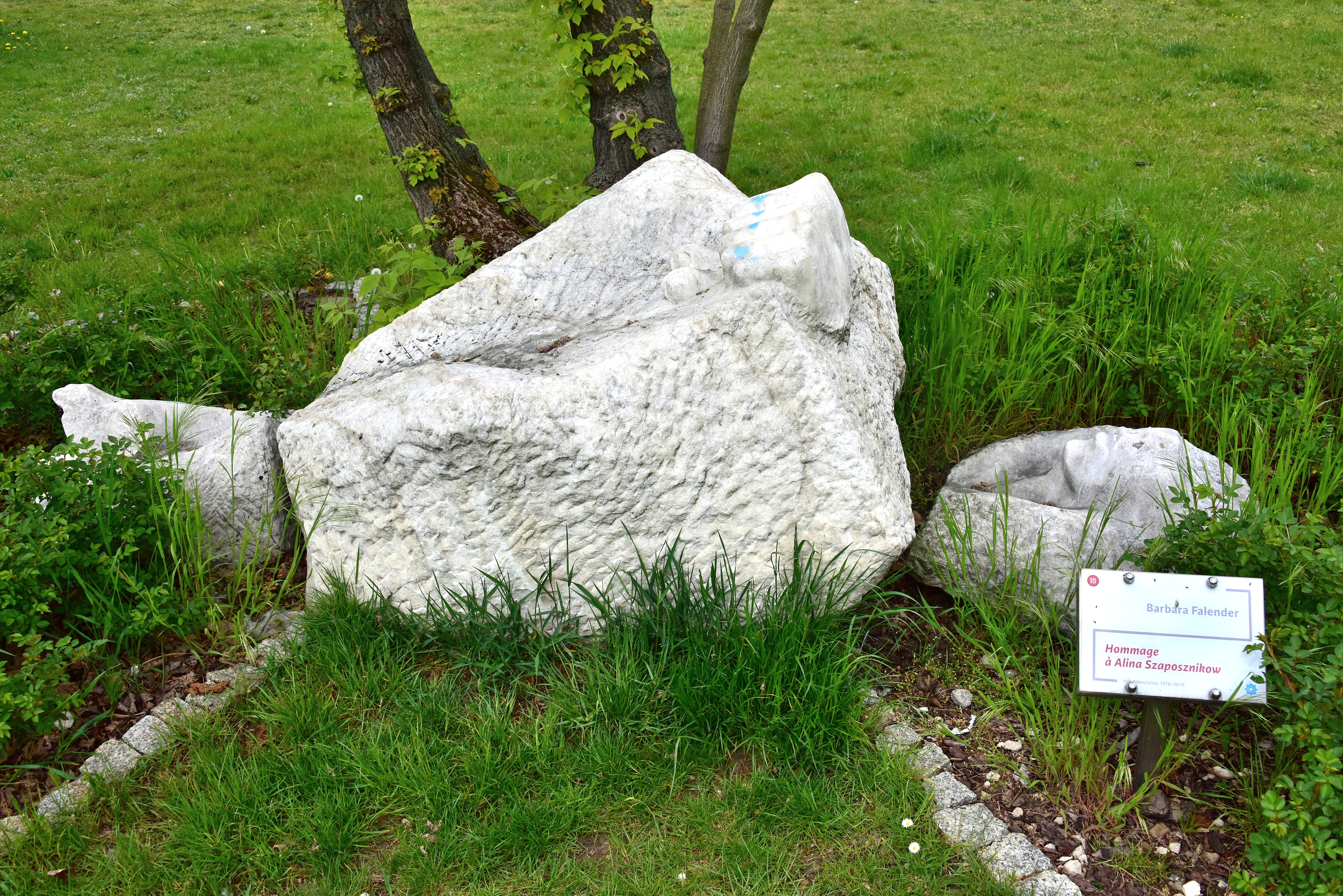 Rzeźba Barbary Falender Hommage a Alina Szaposznikow eksponowana na terenie osiedla Ostrobramska przy ul. Ostrobramskiej róg ul. Komorskiej w Warszawie